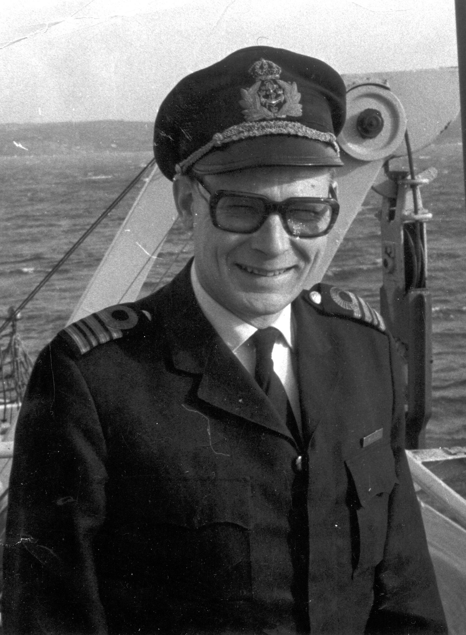 Kommendörkapten Jan Sundlöf